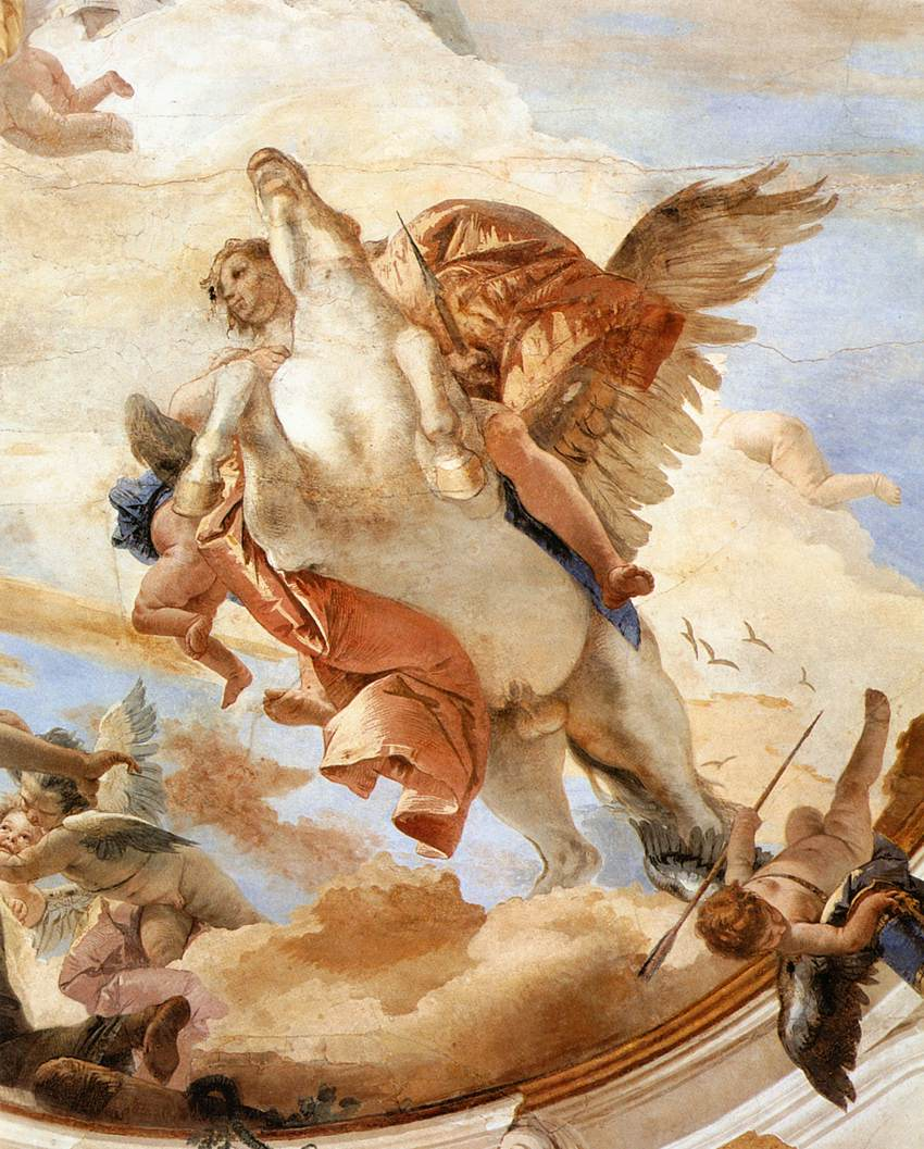 detail